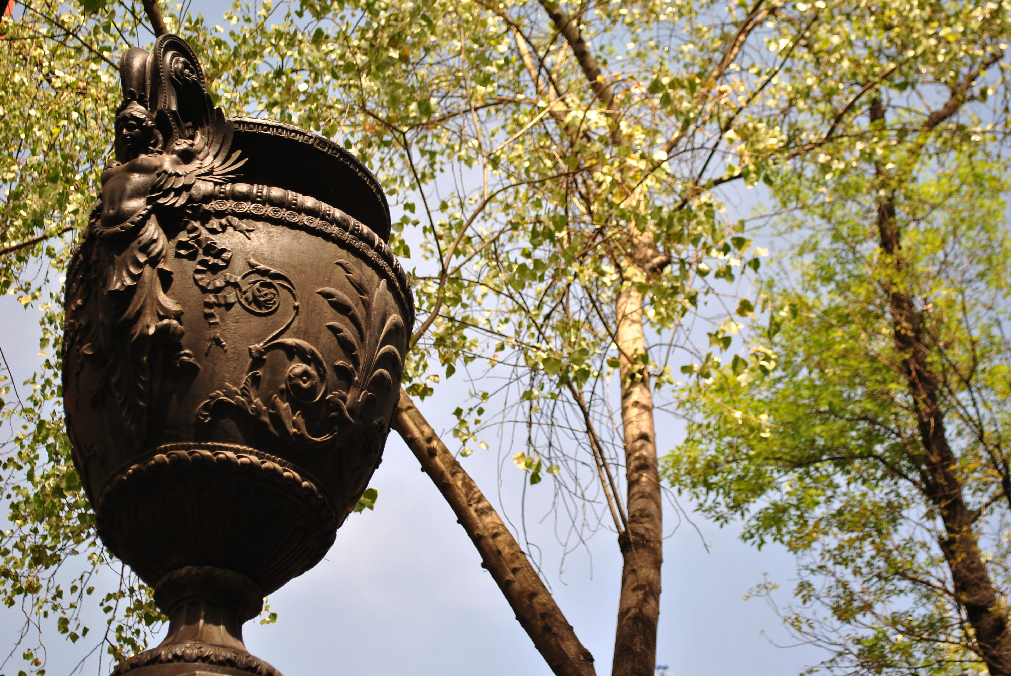 Copón de Paseo de la Reforma, Ciudad de México